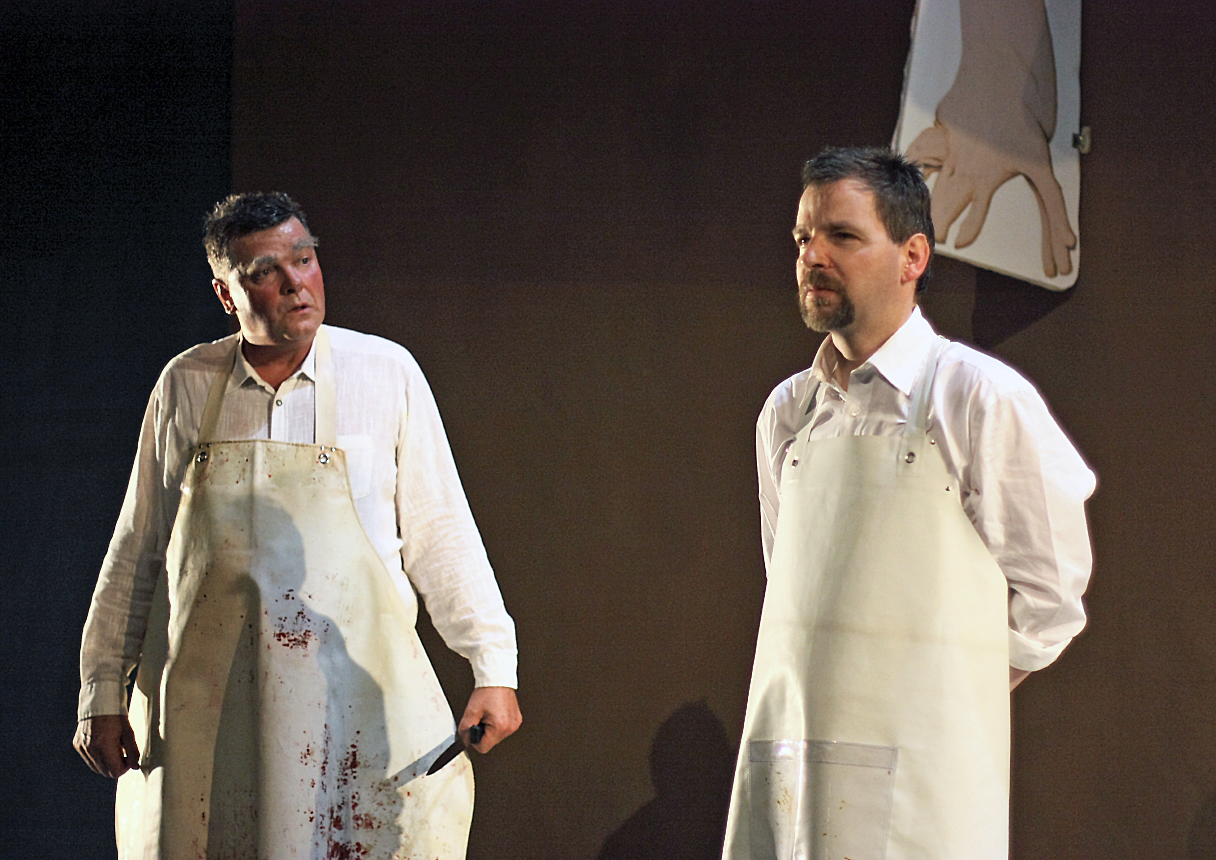 Herbert Walzl in "Geschichten aus dem Wienerwald", Theater im Hof Enns 2009 (l. Herbert Walzl / r. Gottfried Neuner)